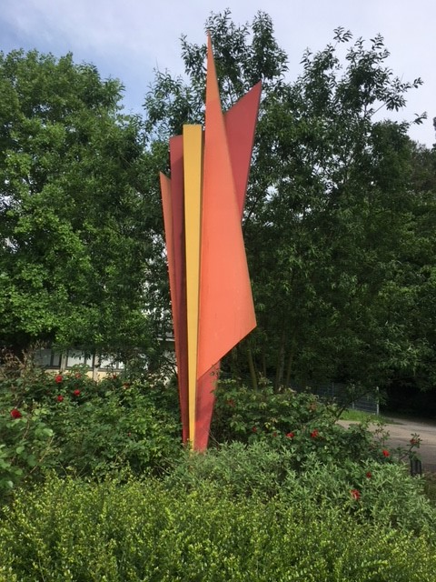 Mahnmal der Vertriebenen von Oskar Kreibich auf der Maubacher Höhe in Backnang